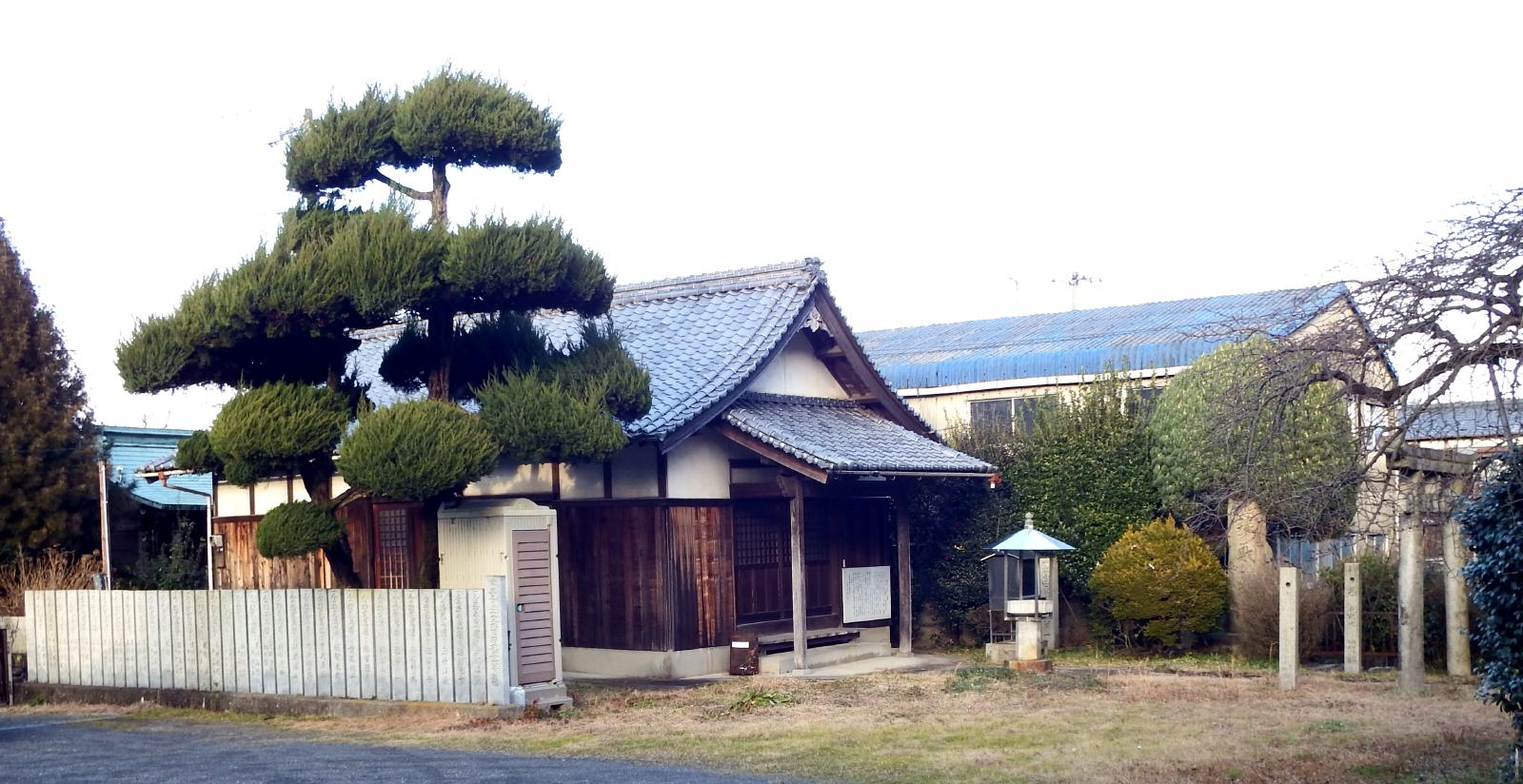 安楽寺（西条市）の弁財天堂